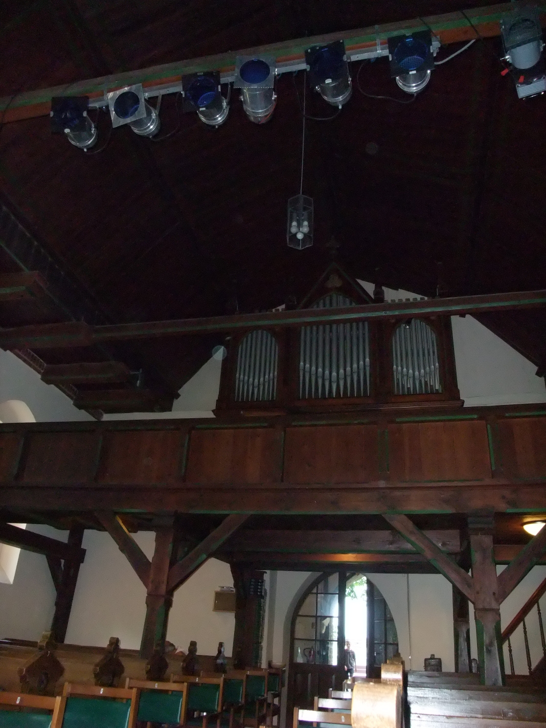 Innenansicht der Kirche in Koserow, Deutschland